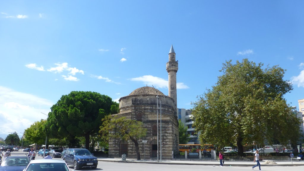 Muradie Moschee in Vlora, Albanien 2014